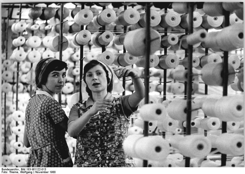 ADN-ZB-Thieme 22.11.1980 -Bez. Karl-Marx-Stadt: Vom Schnürsenkel bis zum hochwertigen Liroflorteppich reicht die u.a. 4 000 Erzeugnisse umfassende Produktionspalette des VEB OPEW Annaberg [VEB Obererzgebirgische Posamenten- und Effekten-Werke Annaberg-Buchholz], einer der bedeutendsten Betriebe der Posamentenindustrie der DDR. Zurichterin Anita Enger (l) und Christine Bergmann, die z. Z. ein Meisterstudium besucht, arbeiten in der Abteilung Häkelgalontechnik, wo u.a. Schonbezüge für Pkw hergestellt werden.